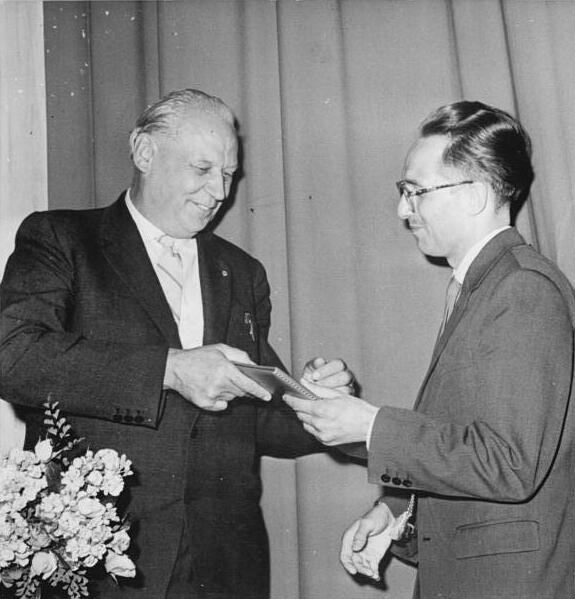 Zentralbild Eckleben 18.6.1961 Vgt-Noa 3. Arbeiterfestspiele des FDGB. Literatur- und Kunstpreis des FDGB verliehen. Ein besonderes Ereignis war am Nachmittag des 17.6.61 die Verleihung des Literatur- und Kunstpreises des FDGB 1961, die das Präsidiumsmitglied des FDGB-Bundesvorstandes Wolfgang Bayreuther im Beisein des FDGB-Vorsitzenden, Herbert Warnke, vornahm. UBz: Herbert Warnke (links) überreichte Helmut Preißler den Literaturpreis des FDGB 1961.